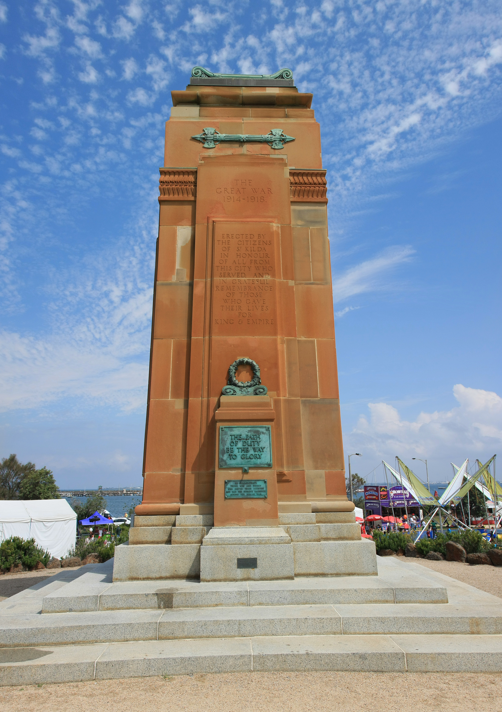 WM in St Kilda